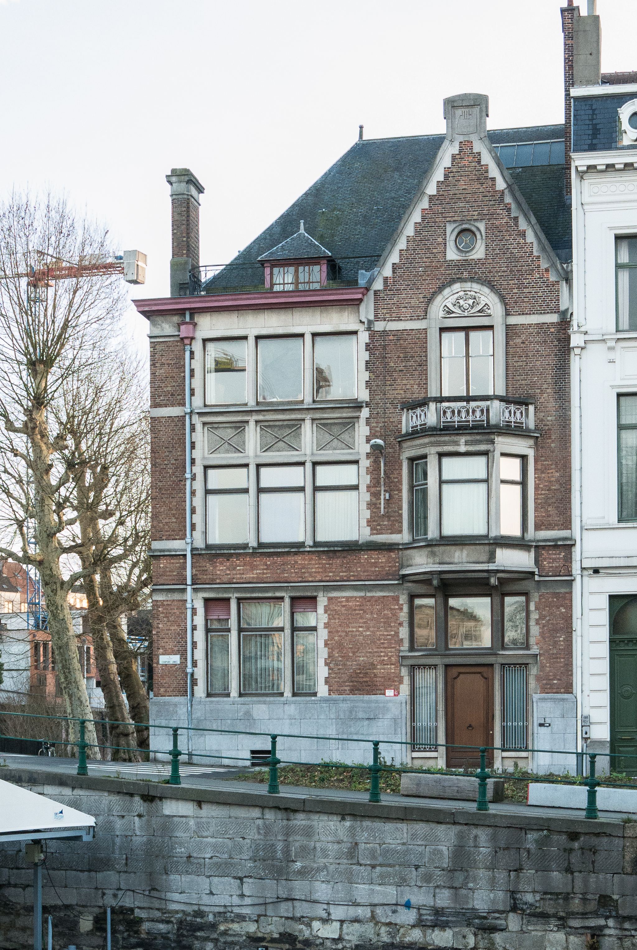 Coupure links nr 1